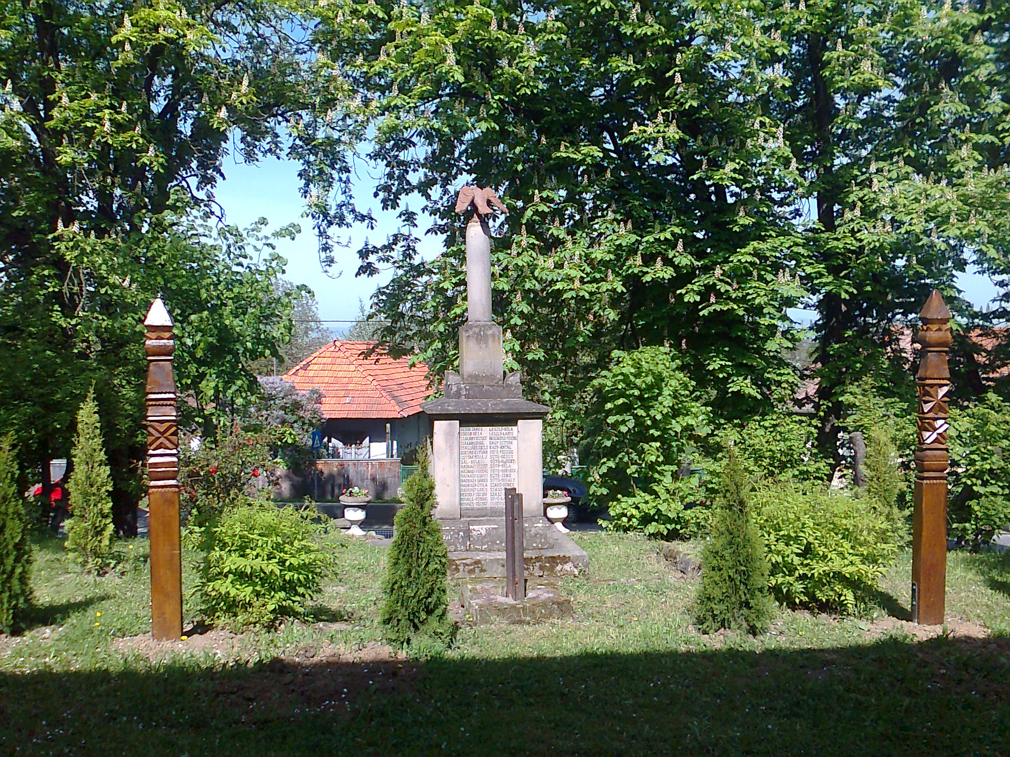 Kopjafák Páván (a háromszéki Zabola része) a hősök emlékműve mellett Bolyai Farkas anyai felmenői emlékére: I. Pávai István (Bolyai Farkas anyjának szépapja) és Pávai Vajna Péter lovashadnagy. Bandi Árpád matematikatanár jóvoltából.